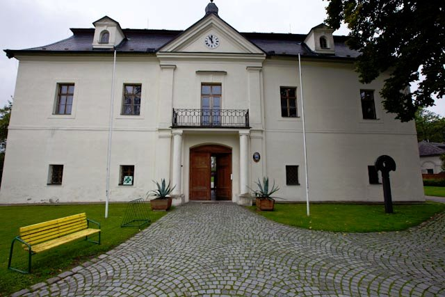 Leitersdorf - Neues Schloss, Eingang, Foto von Fam. Mayerh. 2010